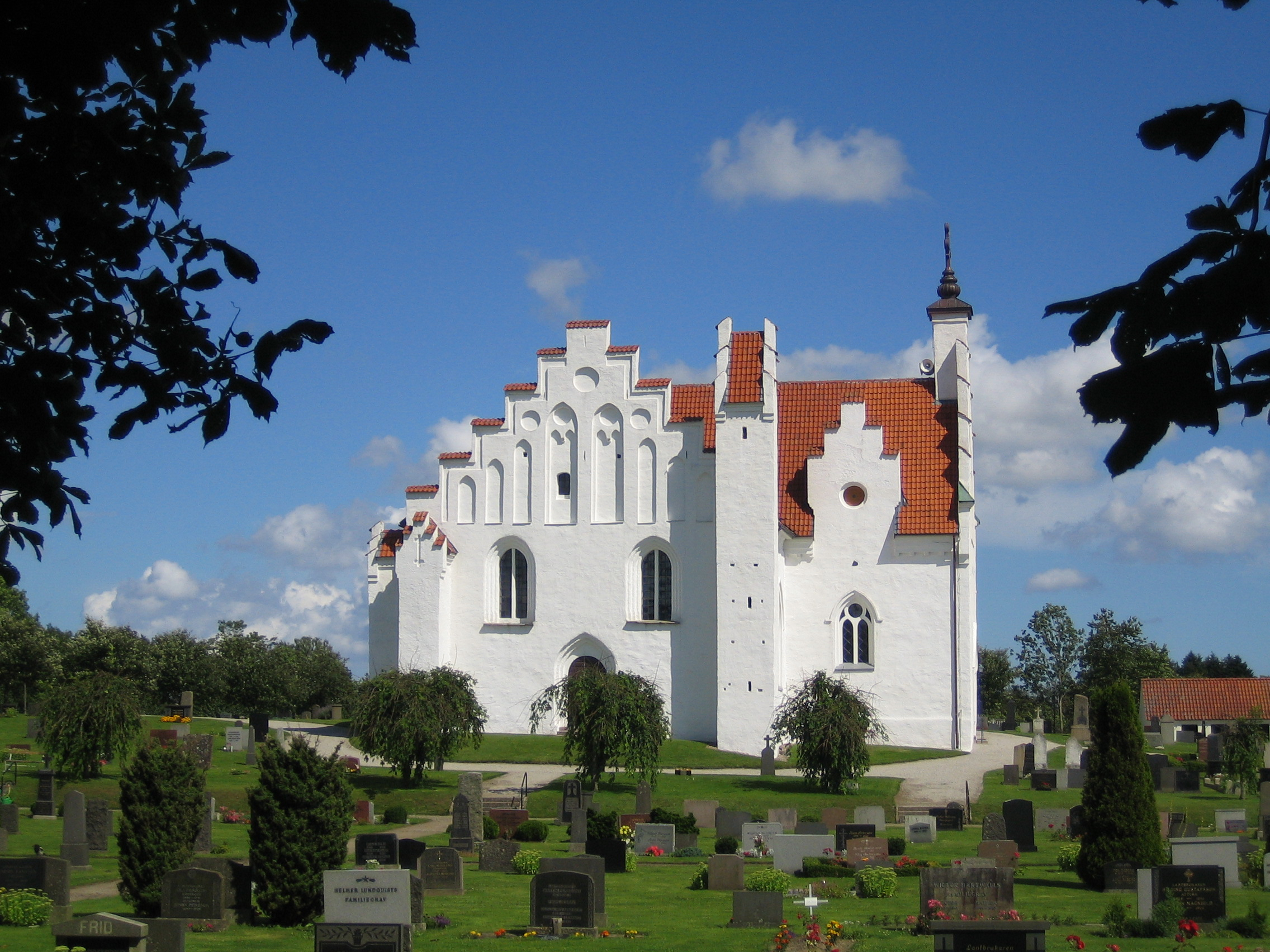 Sankt Olofs kyrka.